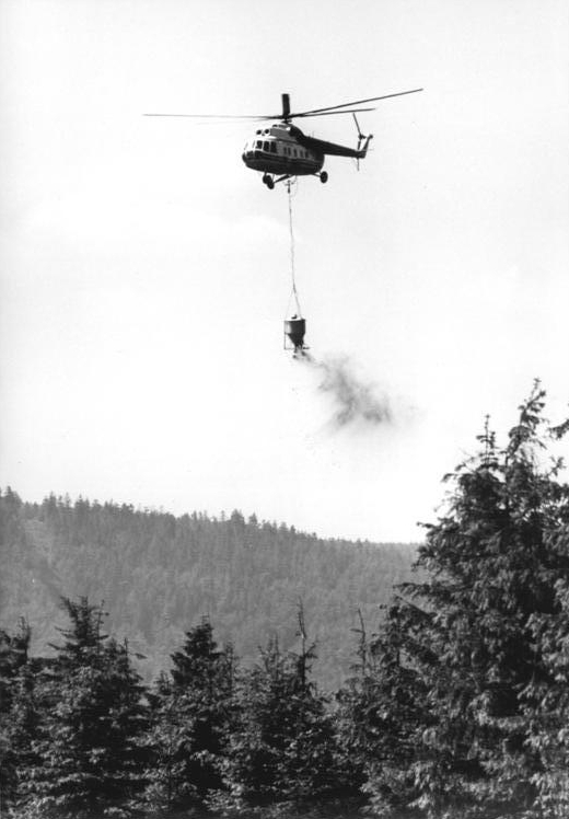 Agrarflieger, Düngen, Forstwirtschaft ADN-ZB Schaar 21.7.1987 Zum Beitrag: Dünger von oben für Thüringer Wälder-Arbeitsflugplätze für den Forstschutz am Rennsteig . Hubschrauber mit angehängtem Container beim Düngerstreuen über Wäldern am Rennsteig. 1987-0721-301N-Hierzu gehören die Fotos 1987-0721-300N302N1